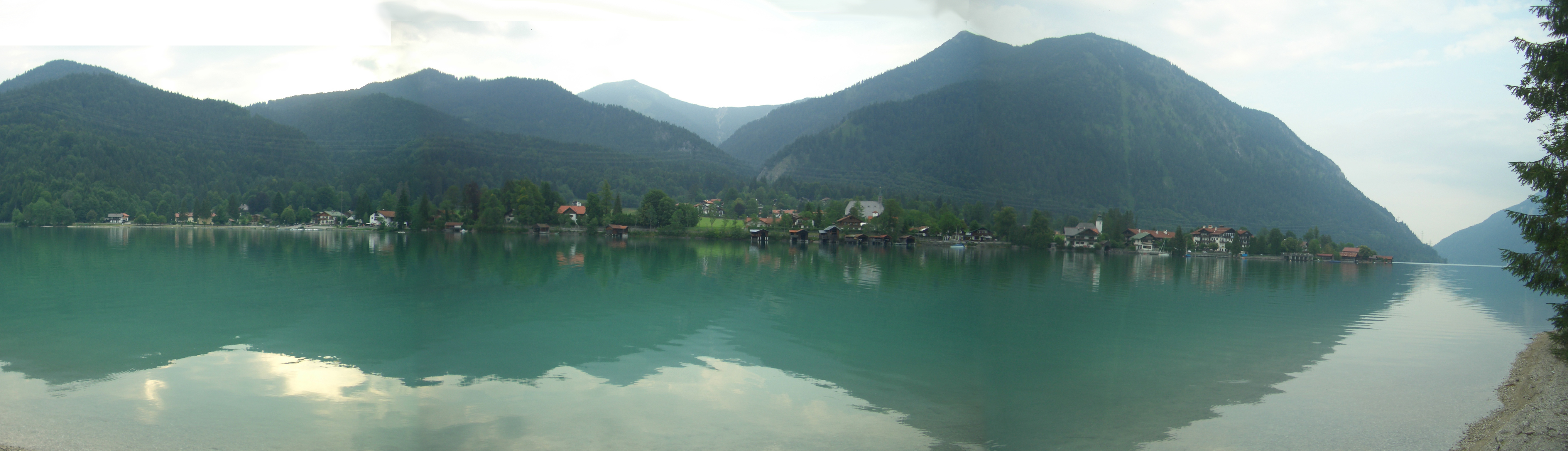 Ortspanorama Walchensee von der Zwergern-Halbinsel aus gesehen, Juli 2007. Links unter der ersten Talstruktur das Gasthaus Edeltraut, Bildmitte im Hintergrund der Heimgarten, rechts davon der Berggrat zum Herzogstand, Martinskopf (spitz), Fahrenberg (rund) mit Herzogstandbahn (als helle senkrechte Struktur im Berg erkennbar), darunter das Ortszentrumm von Walchensee, Blick am rechten Bildrand geht bis zur Bucht von Urfeld.